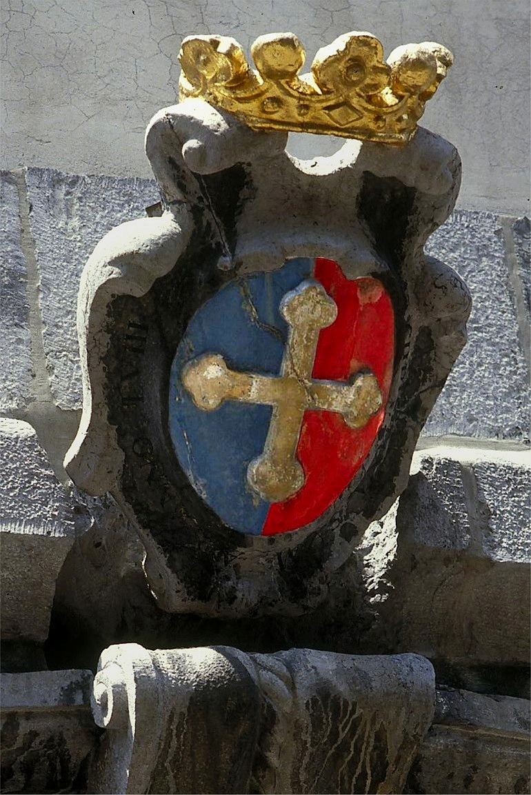 Bildbeschreibung: Wappen am Rathaus von Saint-Maurice Quelle: Spurzem Fotograf: Lothar Spurzem Datum: 03.06.1990